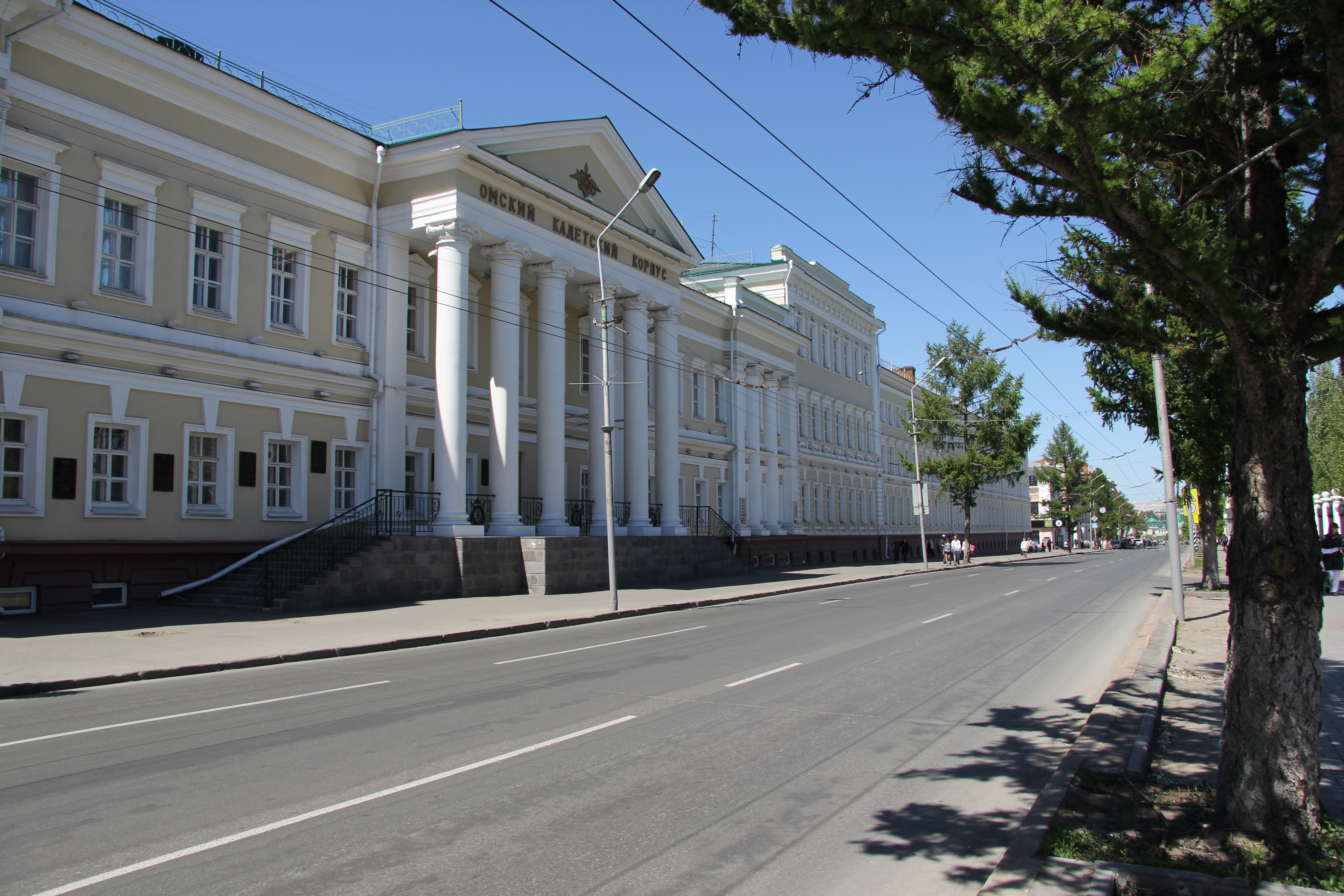 Раньше Сибирский Омский кадетский корпус был на Атаманской улице, в 2013 году это улица Ленина